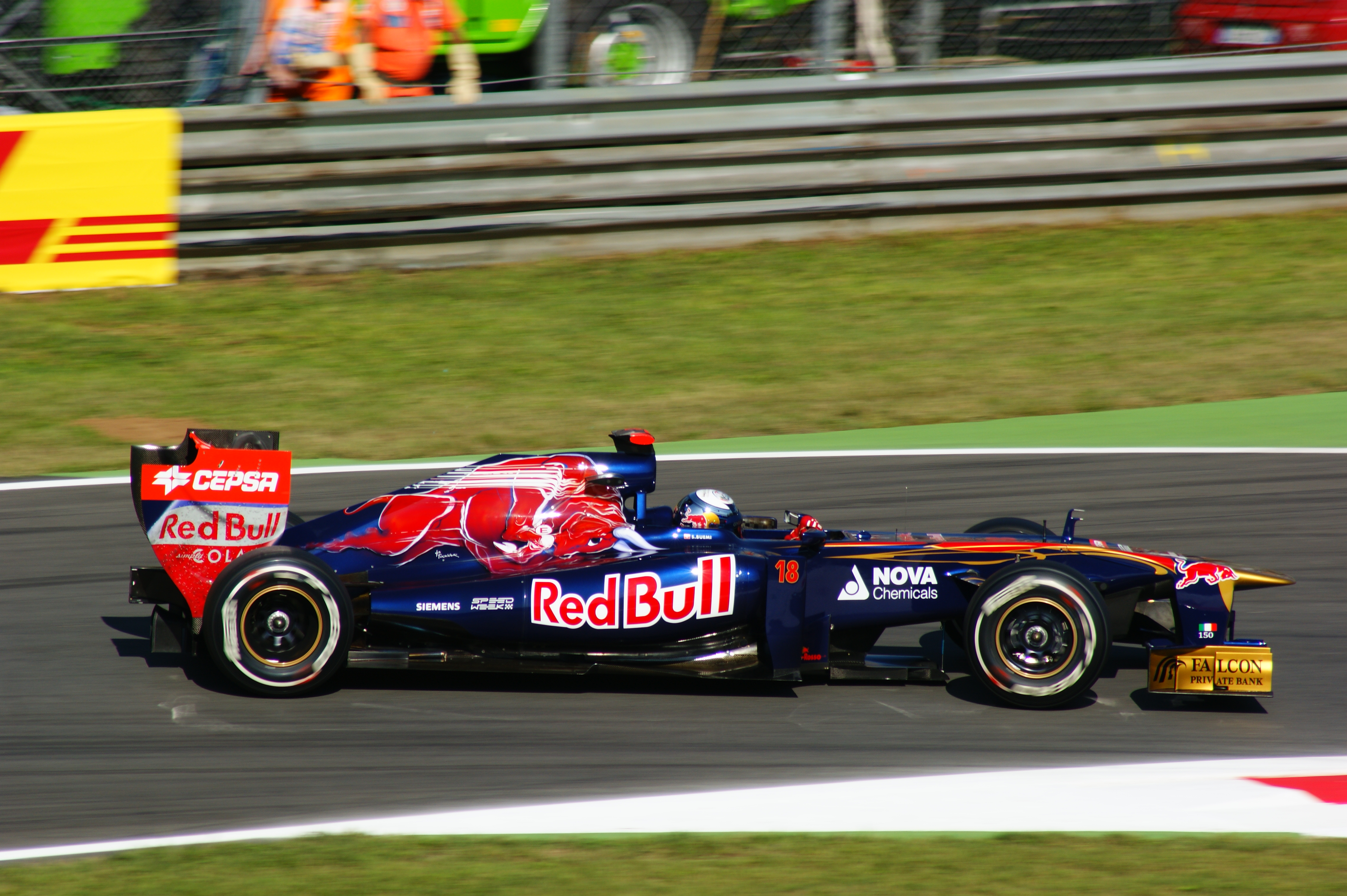 Sébastien Buemi alla prima variante Monza 2011